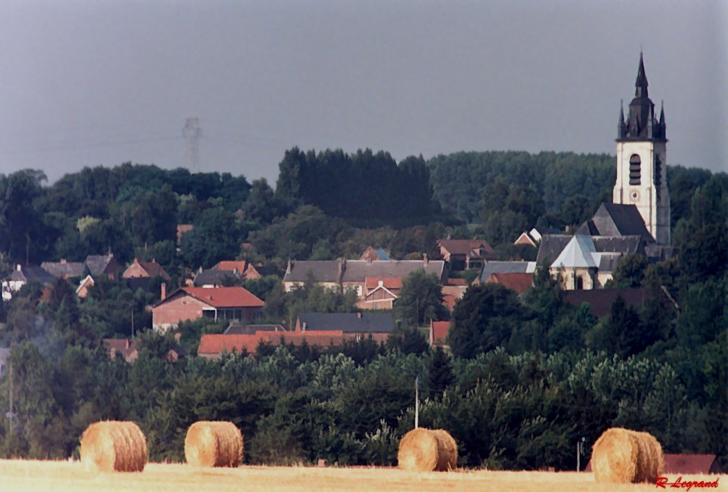 Panorama de Sebourg vu de la Belgique